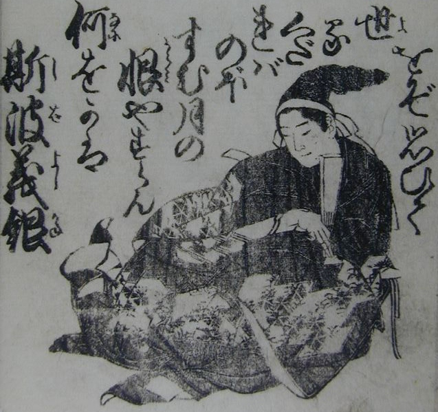 shibayoshikane